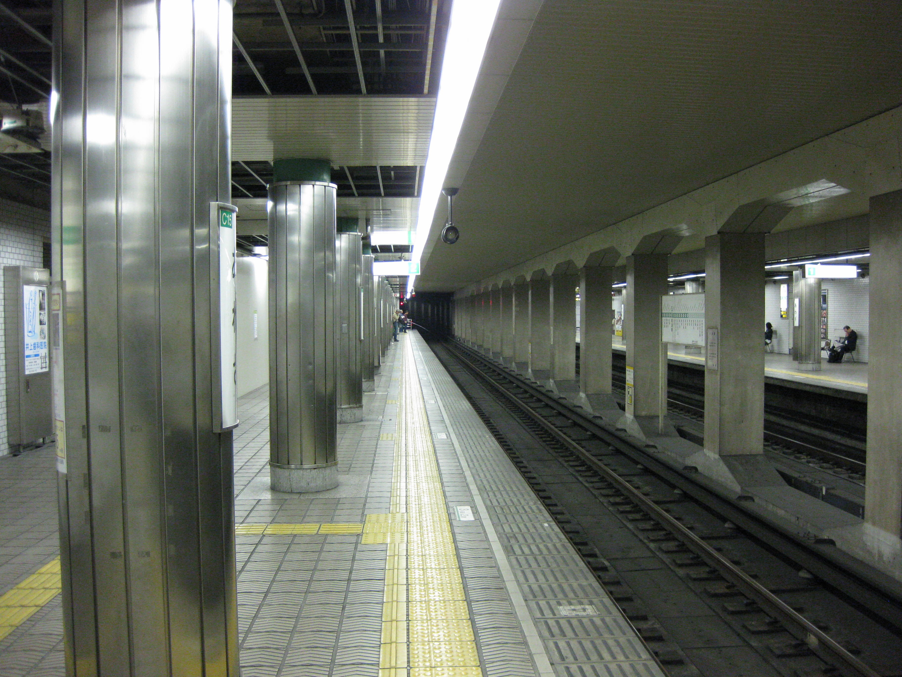 阿波座駅中央線プラットホーム